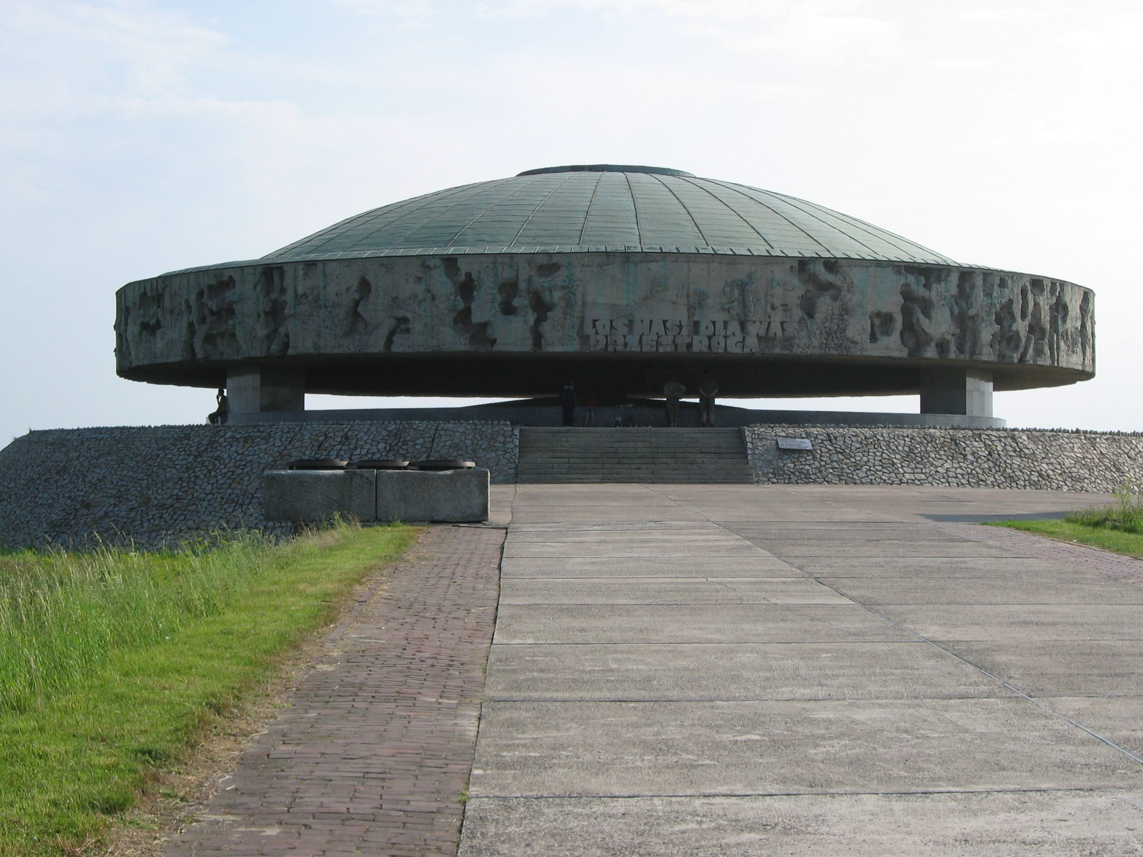 Lublin (KL)